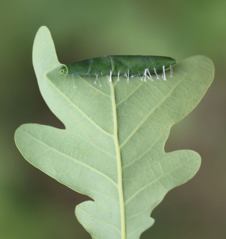 Quer gerolltes Eichenblatt mit einer Raupe von Anacampsis timidella darin; am 9. Mai 2020 in der Schwetzinger Hardt